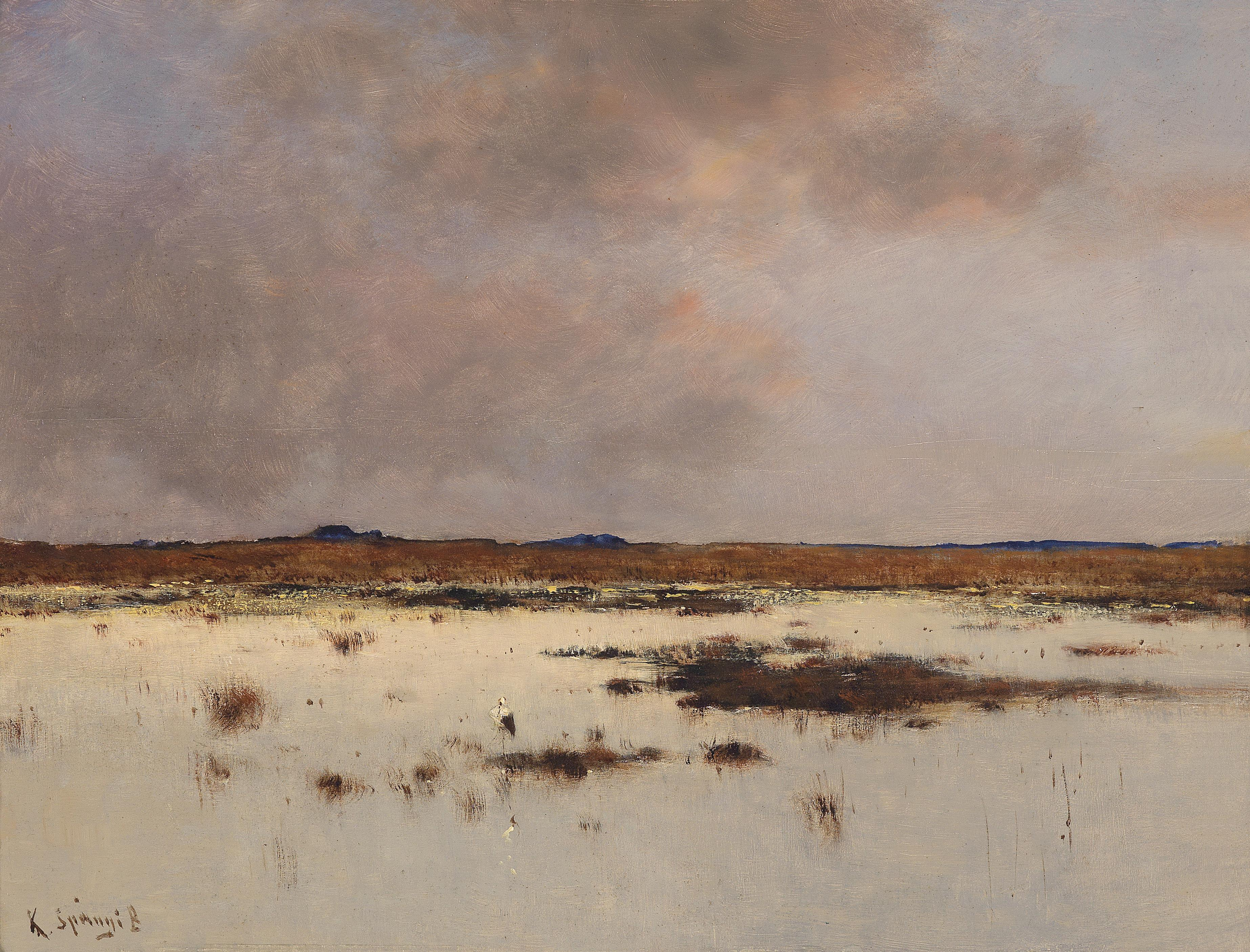 Abendstimmung über einer Flusslandschaft. Singiert K Spanyi B, Öl auf Holz, 31,5 x 41 cm